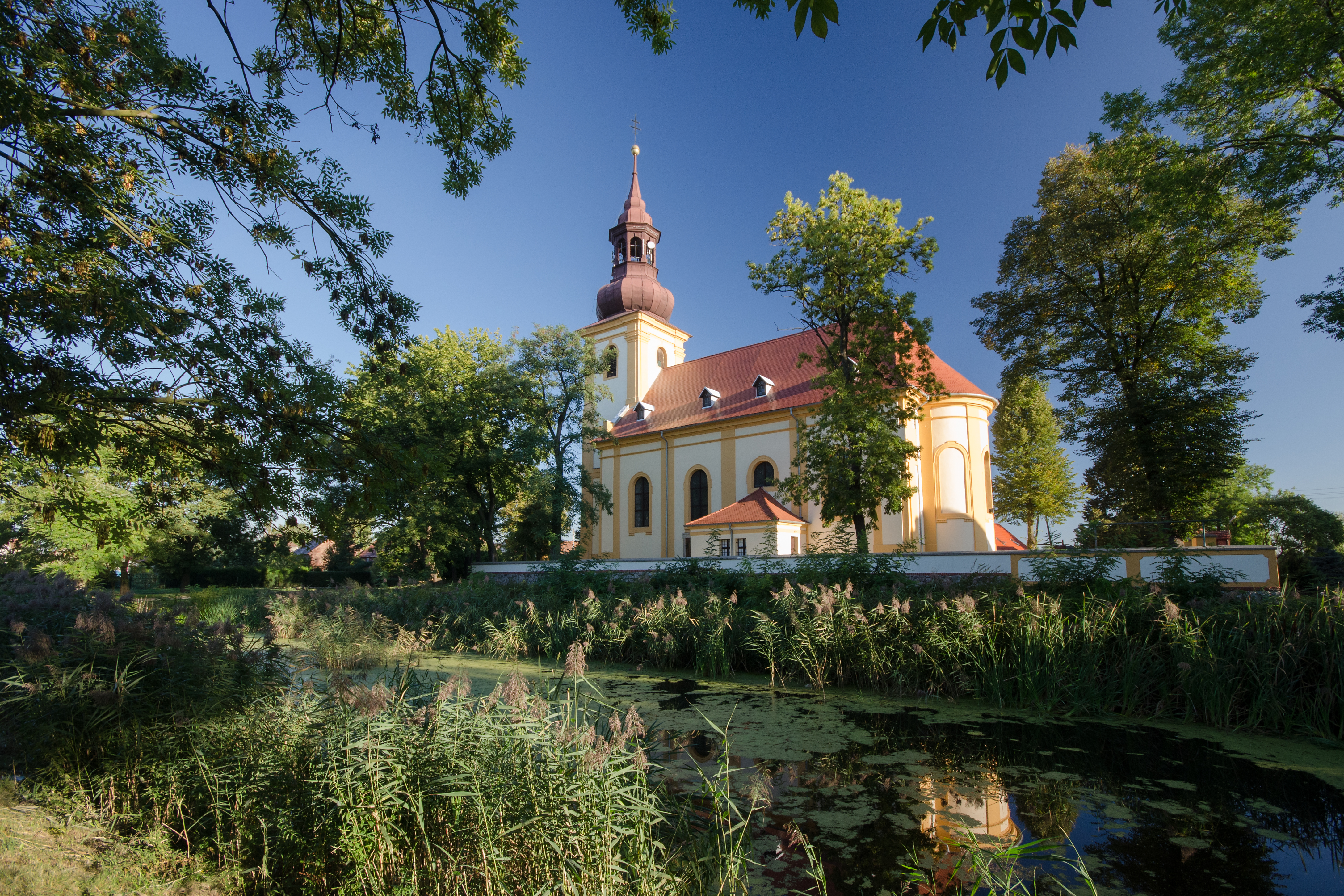 Wilkszyn, kościół p.w. św. Wawrzyńca, XVIII